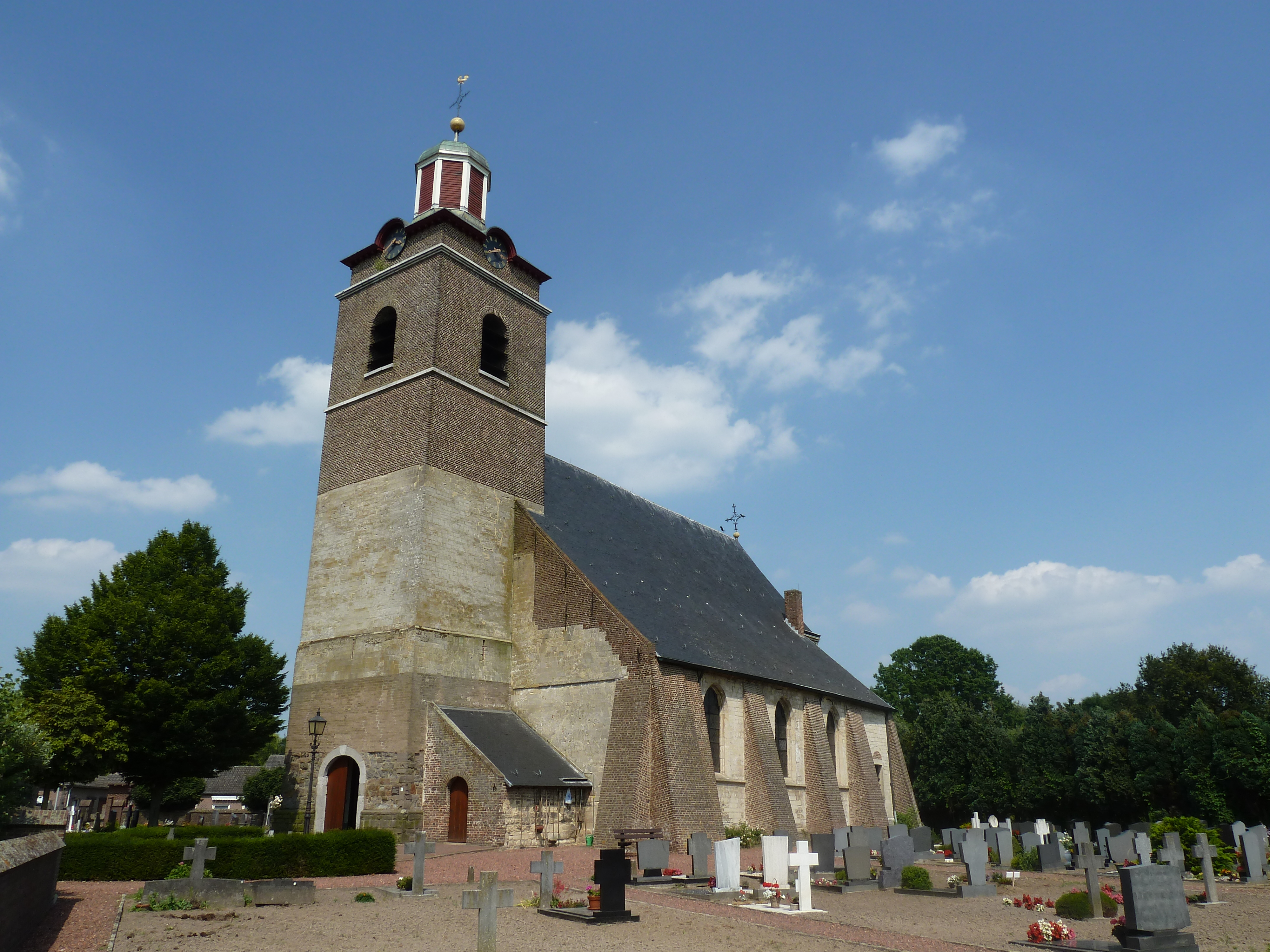 Sint-Lambertuskerk, Neeritter, Nederland